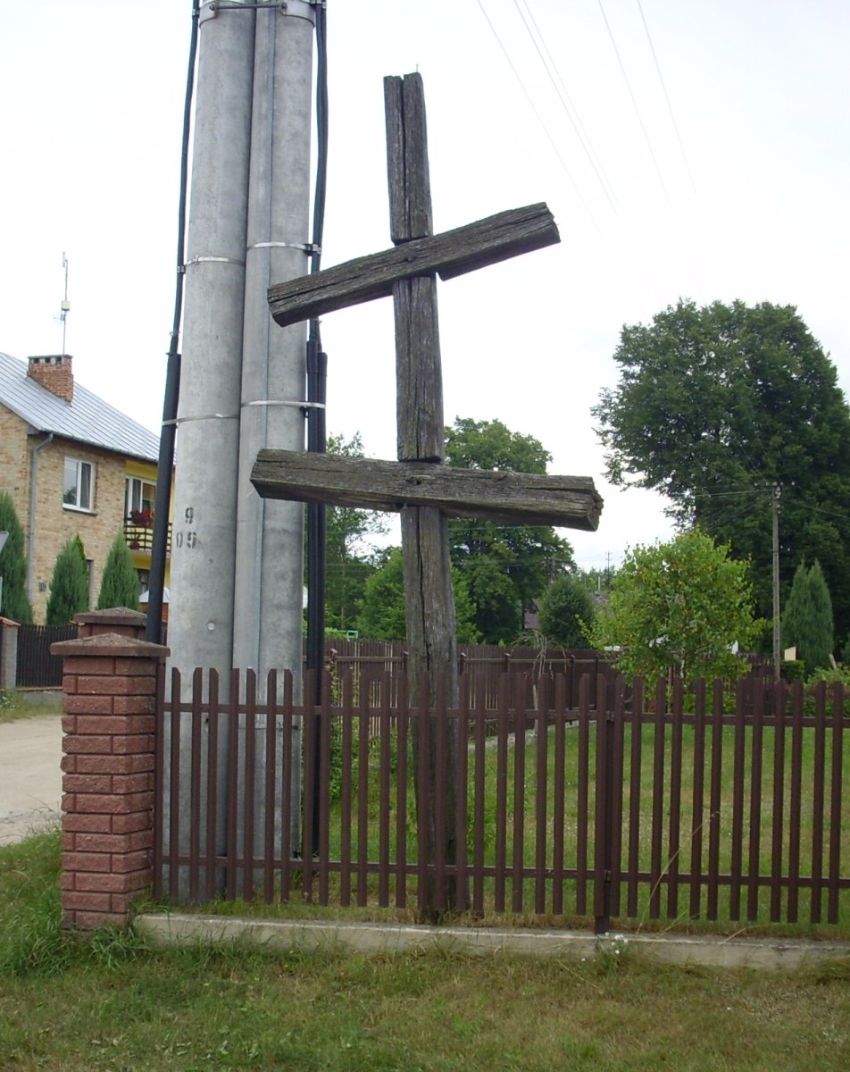 Porosiuki (powiat bialski). Stary przydrożny krzyż – karawaka.